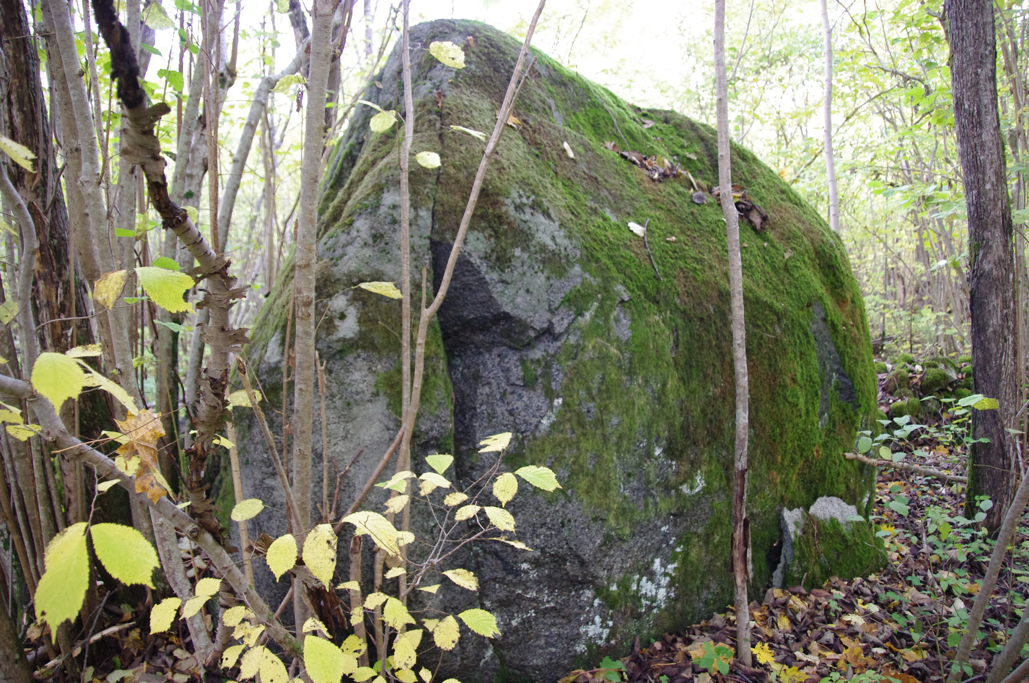 Ohvrikivi "Tondikivi", "Kuradikivi"